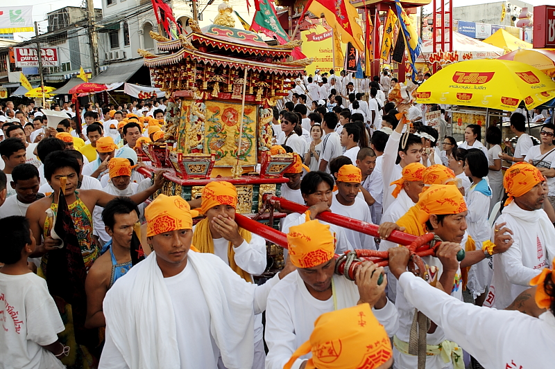 vegetarian festival phuket